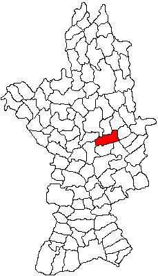 Categorie:Hărţi ale judeţului Olt